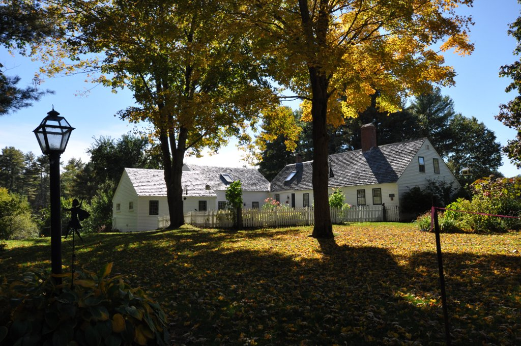 Dorfield Farm, Wells, Maine.